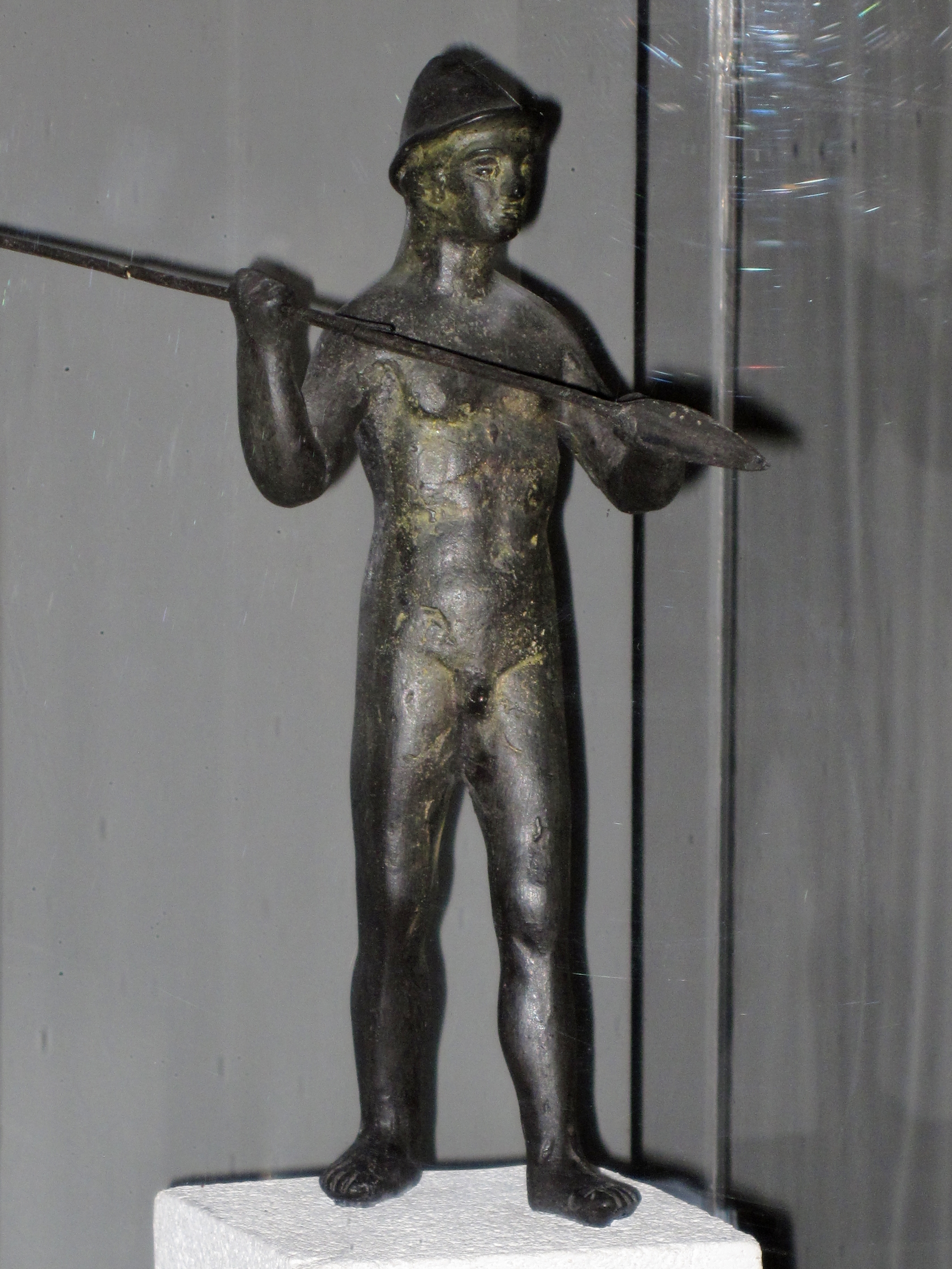 Krieger, 23cm hohe Bronzefigur, von der Marina de sa Punta (Guerrer de sa Marina de sa Punta) nordwestlich von S’Illot im Besucherzentrum des talaiotischen Dorfes von S’Illot (Poblat talaiòtic de s’Illot), Gemeinde Sant Llorenç des Cardassar, Mallorca, Spanien